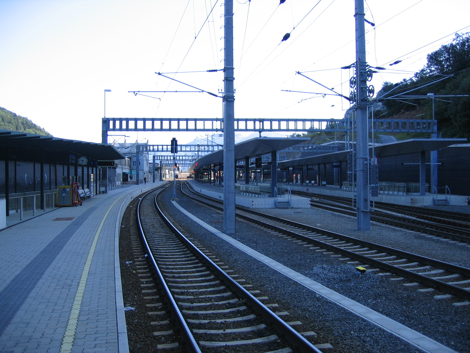 Die Bahnsteige des Feldkircher Bahnhofs